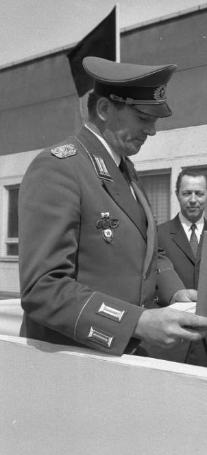 Berlin, 20 Jahre Zentrales Orchester der NVA Zentralbild/Mittelstädt 4.5.71 Berlin: 20 Jahre Zentrales Orchester der NVA Den Kampforden für Verdienste um Volk und Vaterland in Gold verlieh während eines feierlichen Appells am 4.5.71 der Stellvertreter des Ministers für Nationale Verteidigung und Chef der Politischen Hauptverwaltung der NVA, Admiral Waldemar Verner (r.), an das Zentrale Orchester der NVA. Die Auszeichnung nahm der Leiter des Orchesters, Musikdirektor Oberst Gerhard Baumann (l.), entgegen. Abgebildete Personen: Verner, Waldemar: Stellvertretender Minister für Verteidigung, Vizeadmiral, Chef der Politischen Hauptverwaltung der NVA, Zentralkomitee der SED, DDR Baumann, Gerhard: Oberst, Generalmusikdirektor, DDR